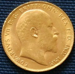 Goldsouvreign aus dem Jahr 1907